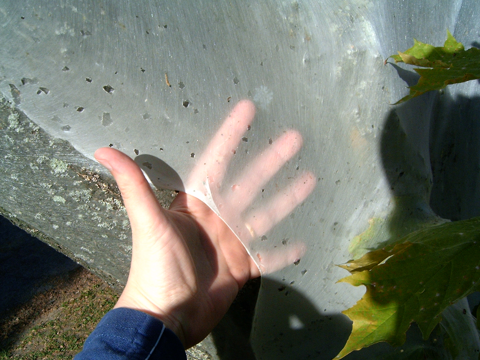 Yponomeuta Evonymella, häggspinnmal, Ermine moth, spökträd, ghostree